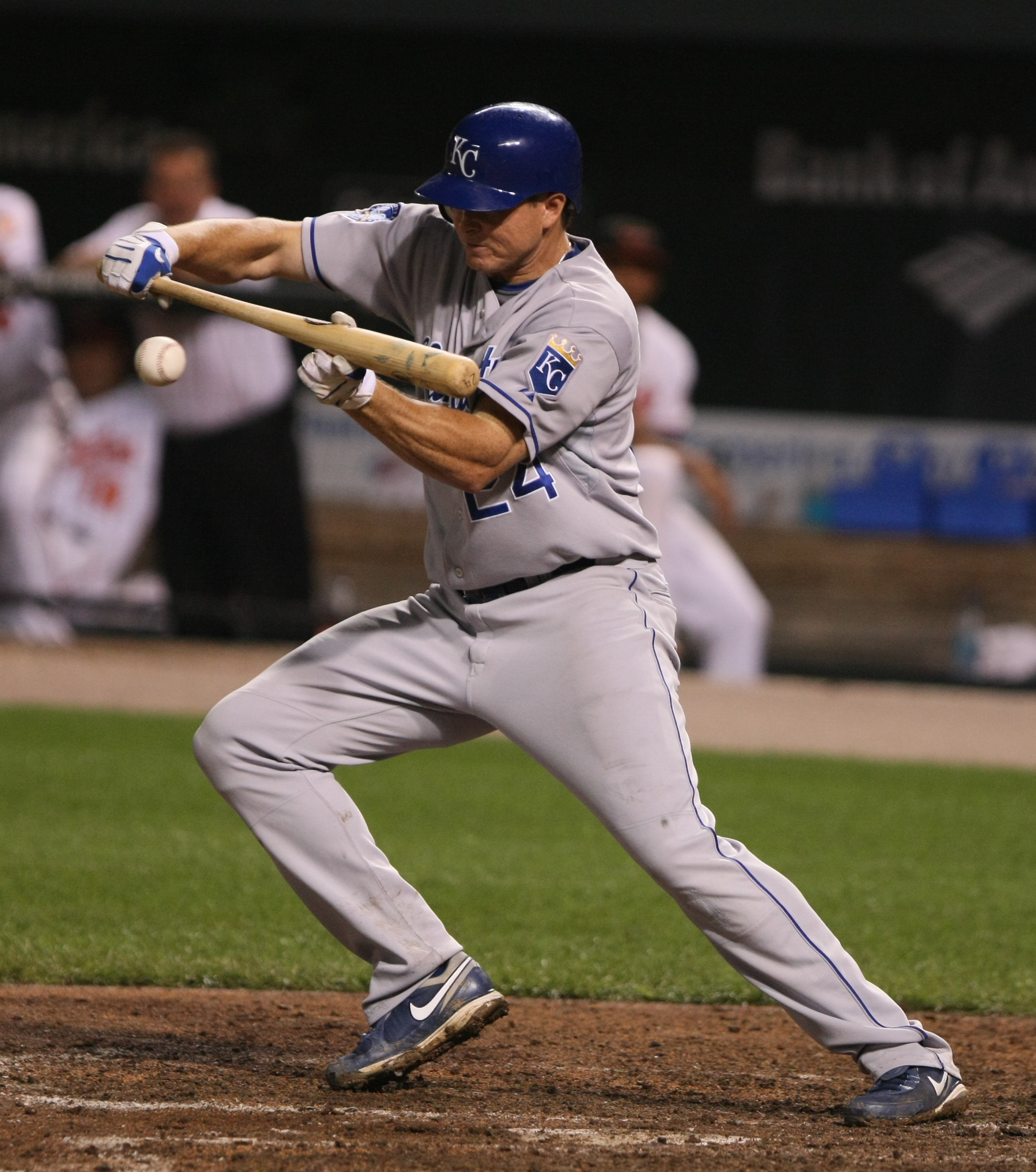 Mark Teahen